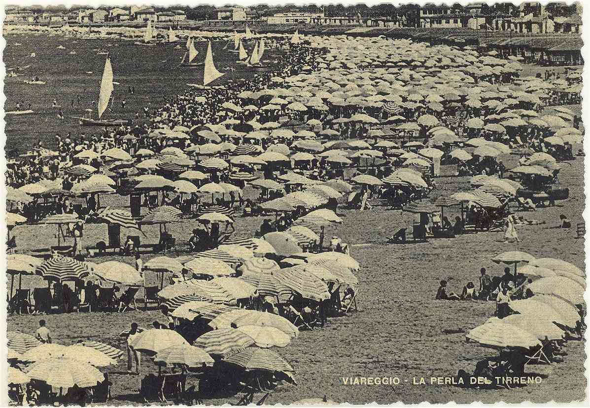 LU Viareggio "la perla del Tirreno" - la spiaggia